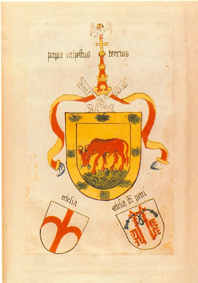 Ingeram-Codex der ehemaligen Bibliothek Cotta pappa calixtus/tercius (Alonso de Borja 1378-1458, Papst 1455- 58) eclesia eclesia s(anc)ti petri